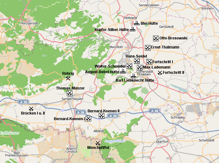 Kupferschieferbergbau des Mansfeld Kombinates